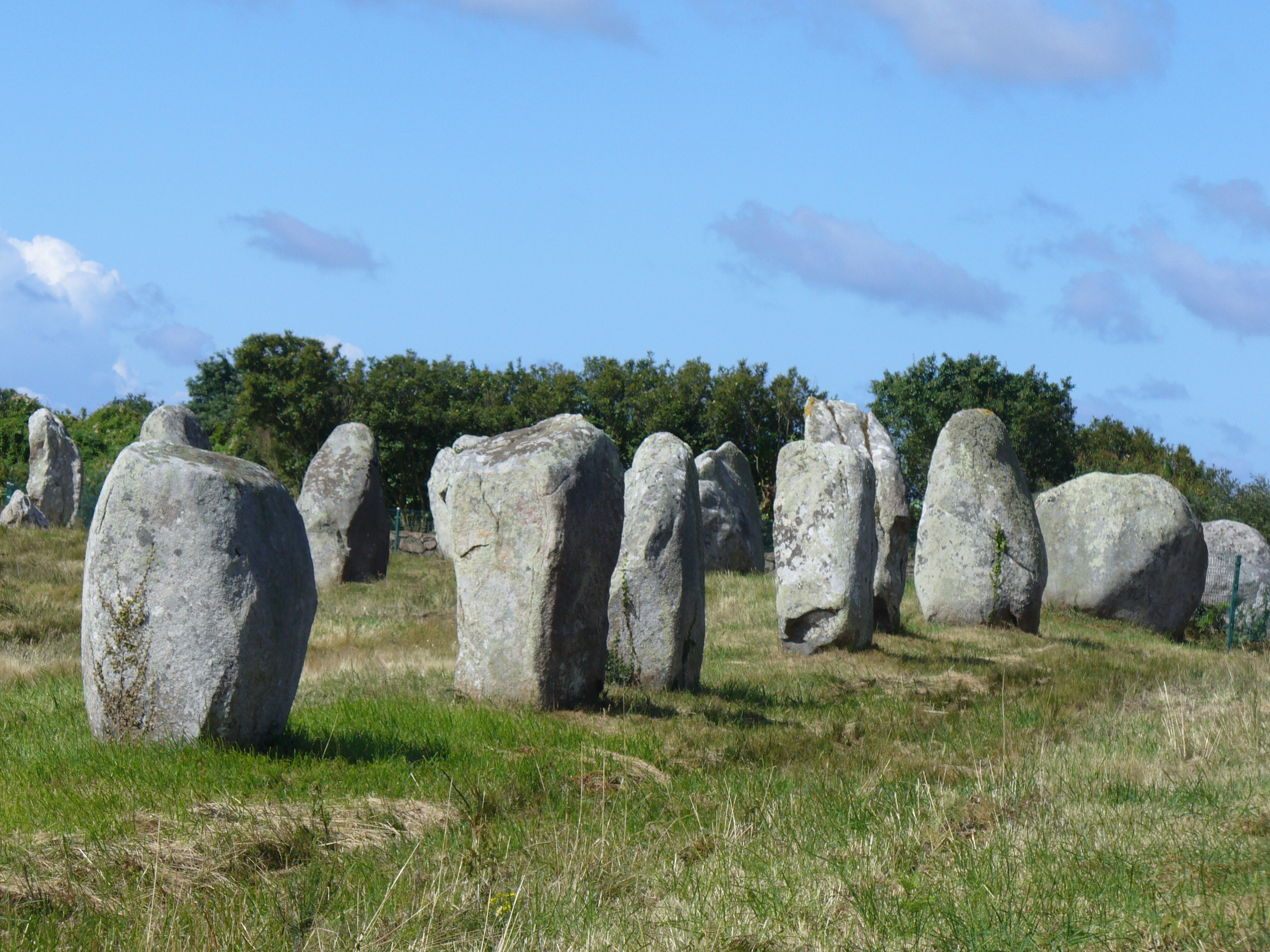 1099 Menhire,bis zu 4 Meter hoch,von Ost nach West in 1167 Meter Langen Alignements(Steinreihen) in einem Halbkreis(Cromlechs) endend. (Jungsteinzeit, Neolithikum ,Neolithic ,Néolithique 4500-2300 v.Chr.) Megalithanlage von Le Ménec, Carnac ,Departement Morbihan ,Bretagne